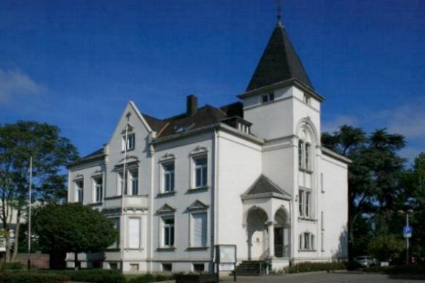 Denkmal Nr. 7 in Grefrath-Oedt